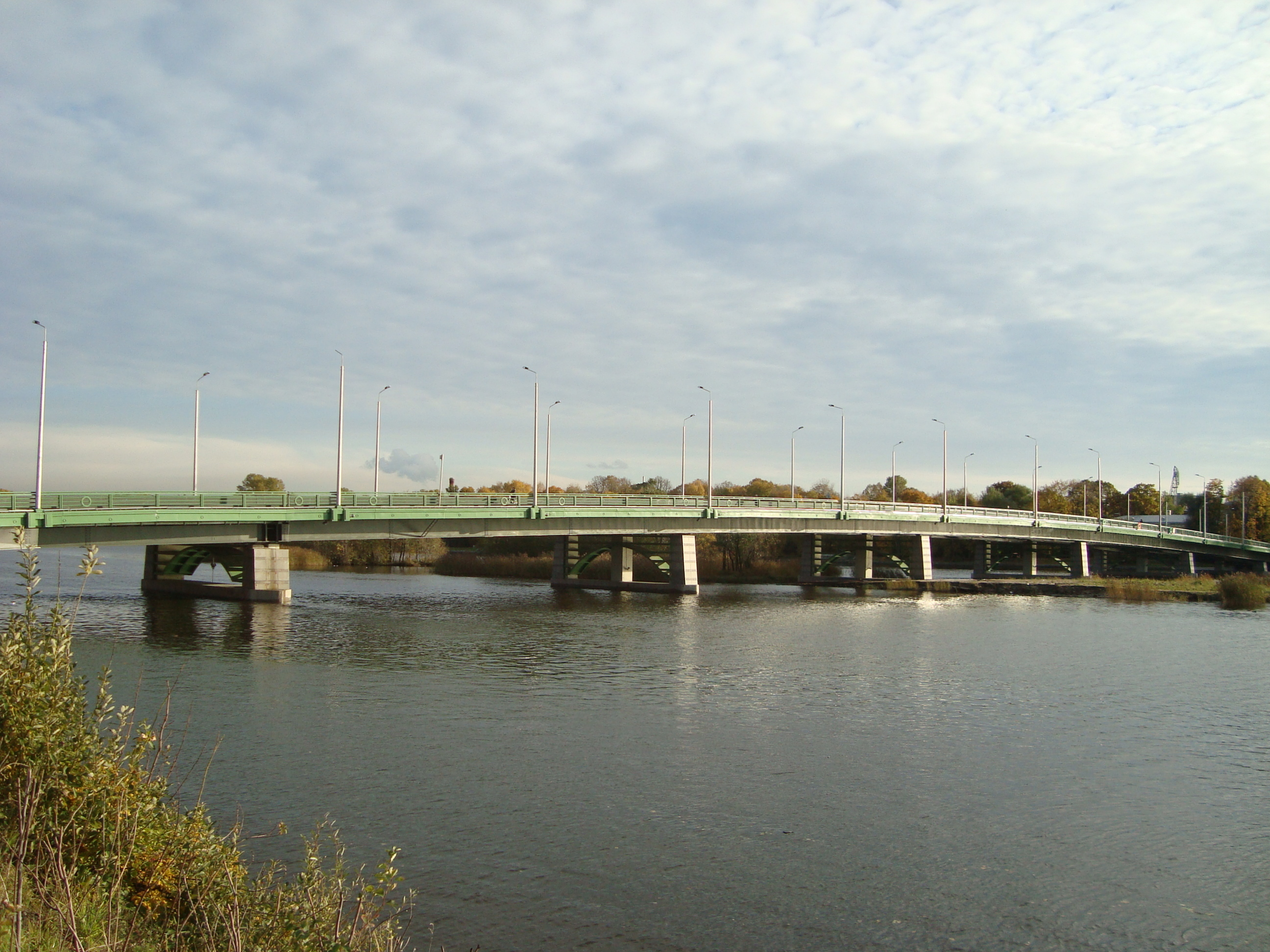 Большой Петровский мост через Малую Невку в Санкт-Петербурге